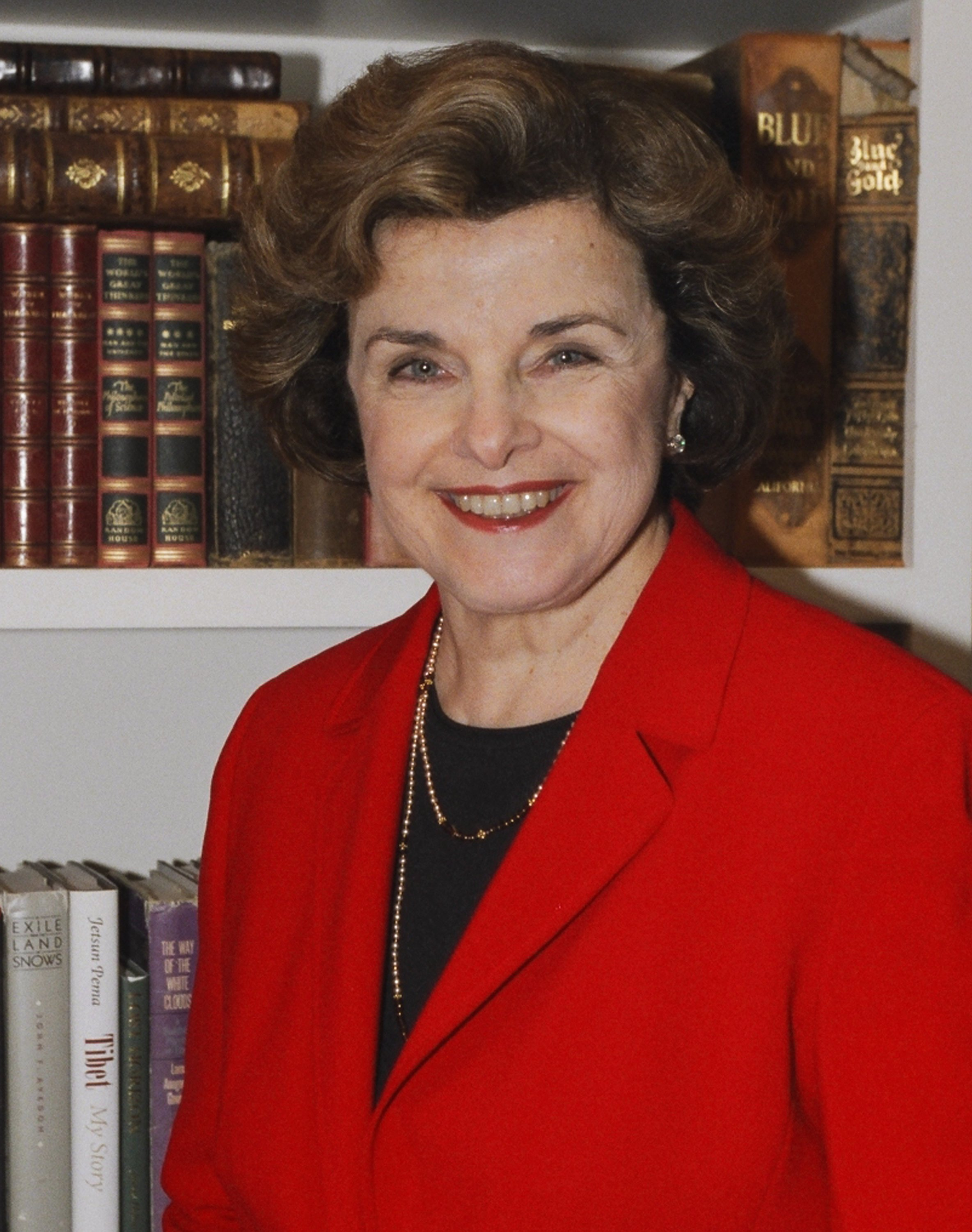 Dianne Feinstein